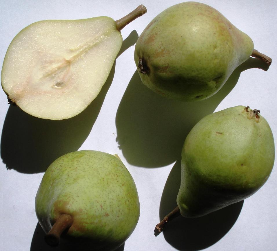 Pyrus - Clapps Liebling